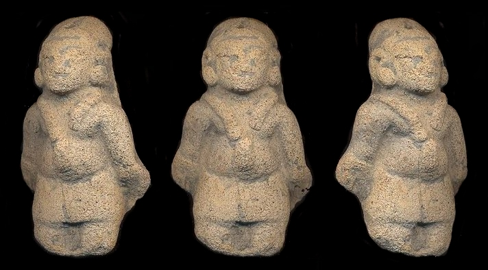 Statuette en terre cuite de la culture Pipil provenant du Guatemala.